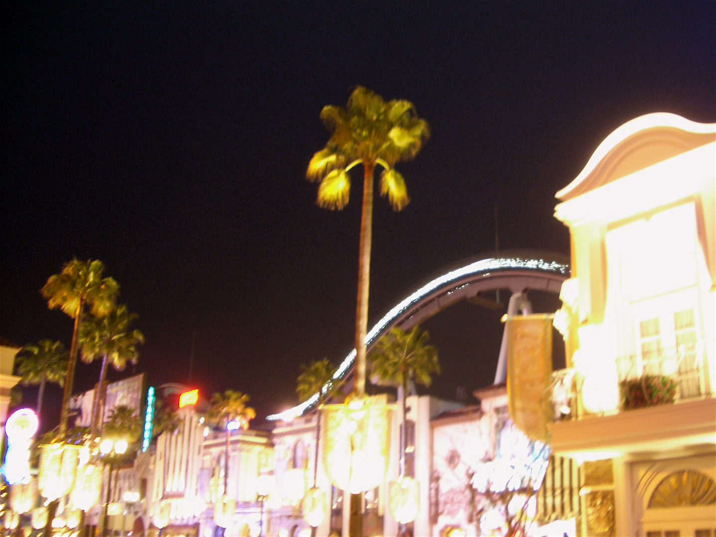 @USJ